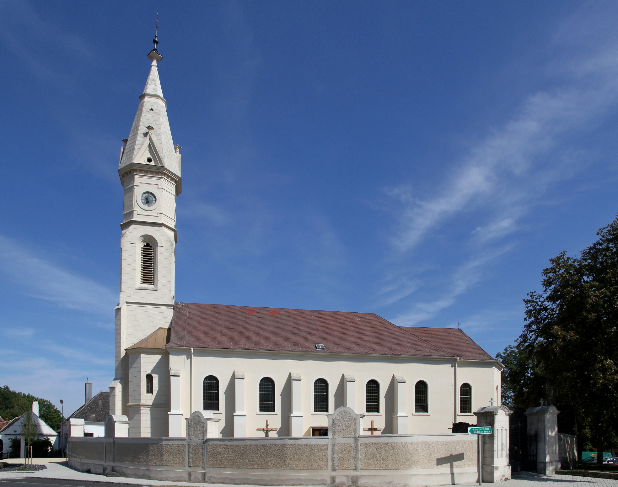 Katholische Pfarrkirche hl. Martin der burgenländischen Marktgemeinde Markt St. Martin. Ein Sakralbau aus dem Ende des 18. Jahrhunderts, der 1872 umgebaut wurde. Die Einrichtung stammt aus dem Ende des 19. Jahrhundert. Der Turm wurde laut Inschrift 1906 errichtet.